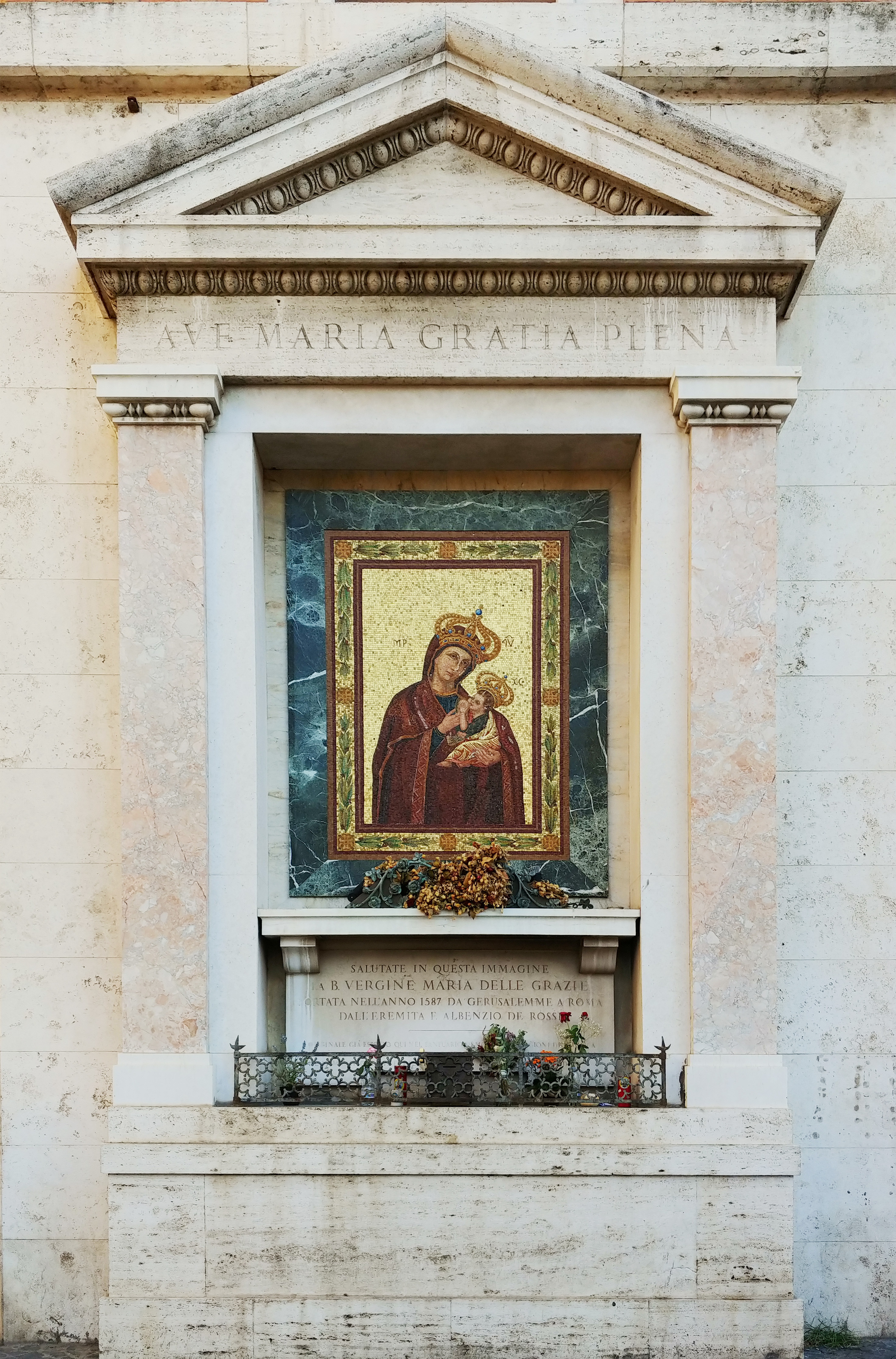 Edicola della Madonna delle Grazie di Borgo, all'incrocio tra borgo Angelico e via di Porta Angelica. Sorge sul sito dell'antica chiesa omonima, demolita nel 1939.